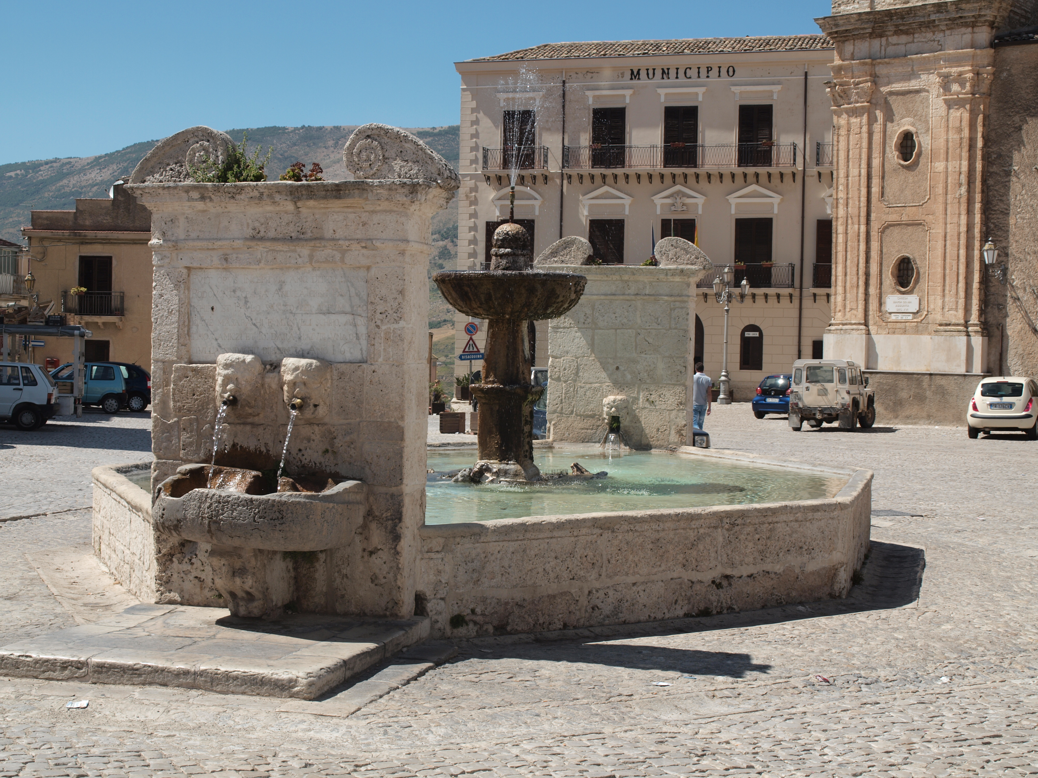 Fontana del Seicento This is a photo of a monument which is part of cultural heritage of Italy.